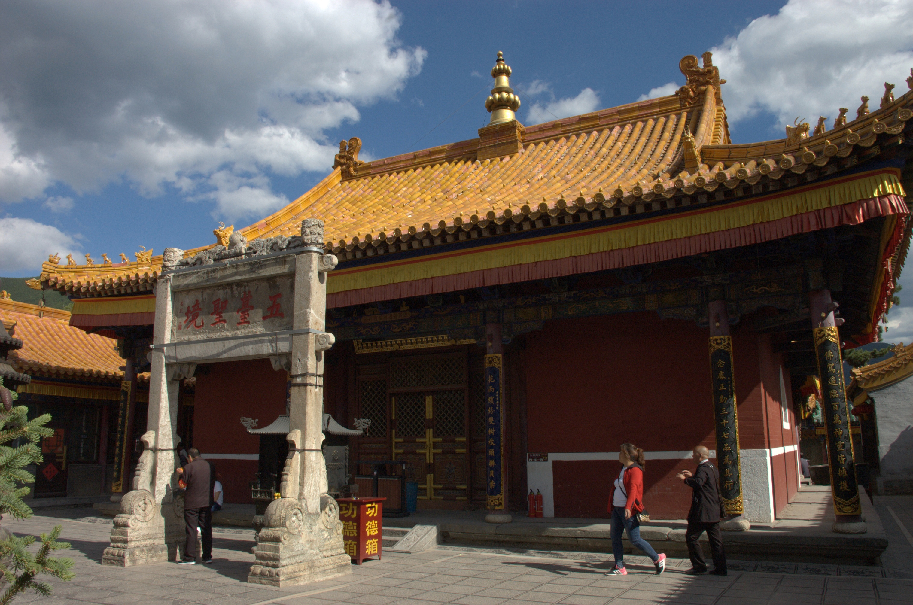 山西五台山菩萨顶